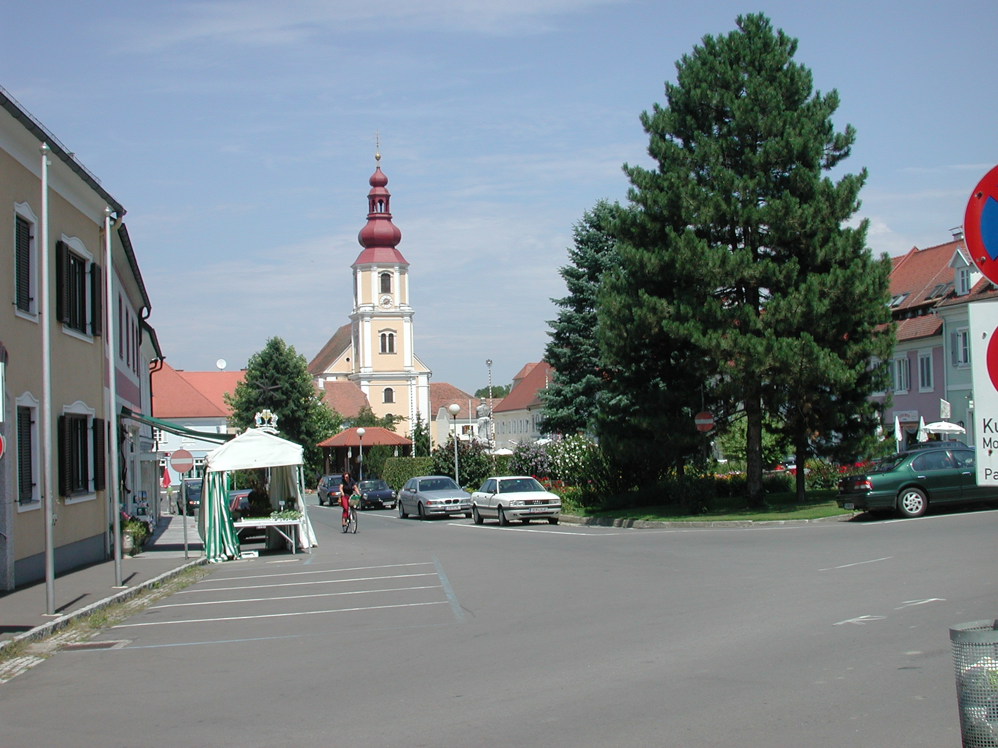 Hauptplatz und Kirche von Fehring